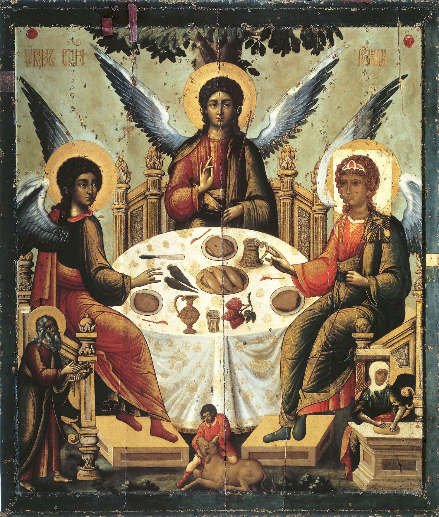 Holy Trinity Icon. Святая Троица. Тихон Филатьев. Запись 1700 года на левкасе 14 века. Успенский собор